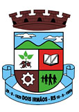 Brasão do Município de Dois Irmãos, RS, Brasil